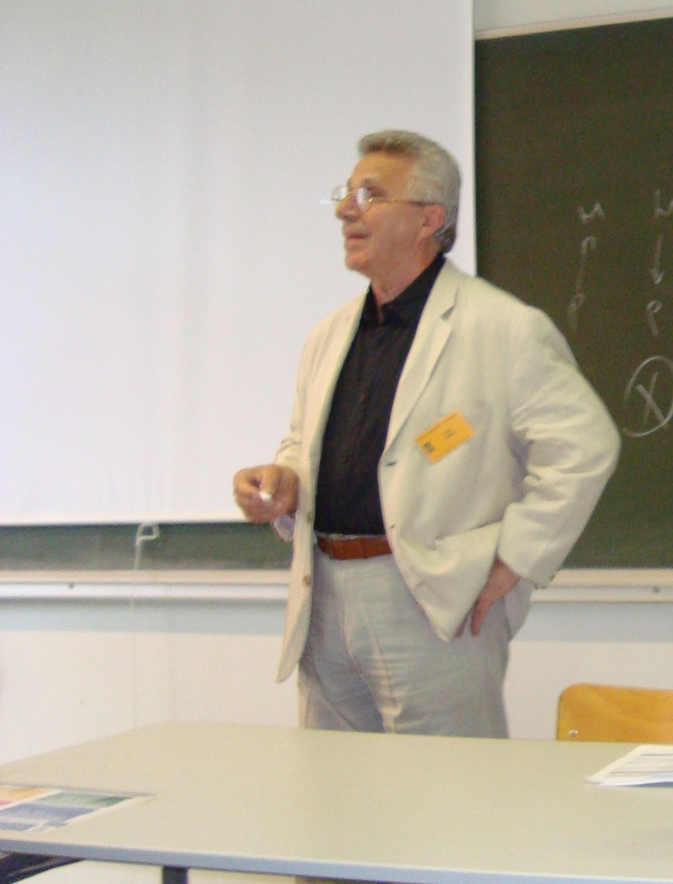 Ioan Biris - Prezentare la Congresul de filosofie - Bruxelles 2012